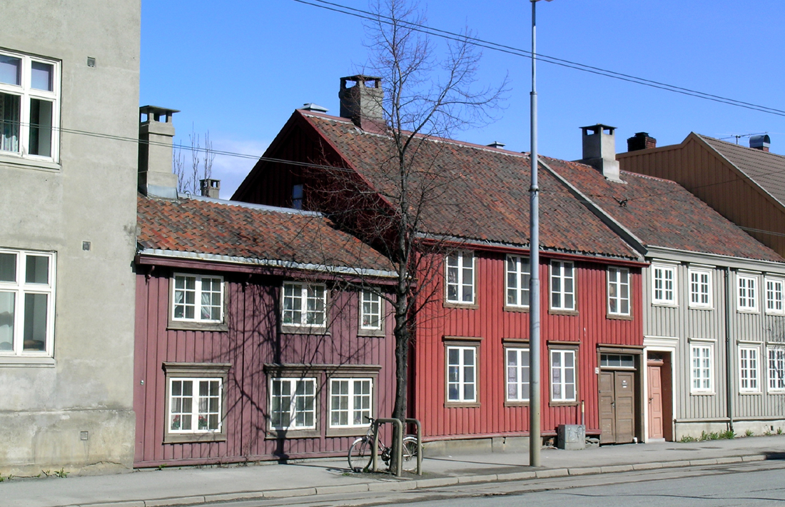 Kongens gate 80 (senter) og 82 (nærmest), Trondheim. Fasadene er endra, men dimensjonene viser typiske hus for byen fra henholdsvis 1800-tallet og tidlig 1700-tall.